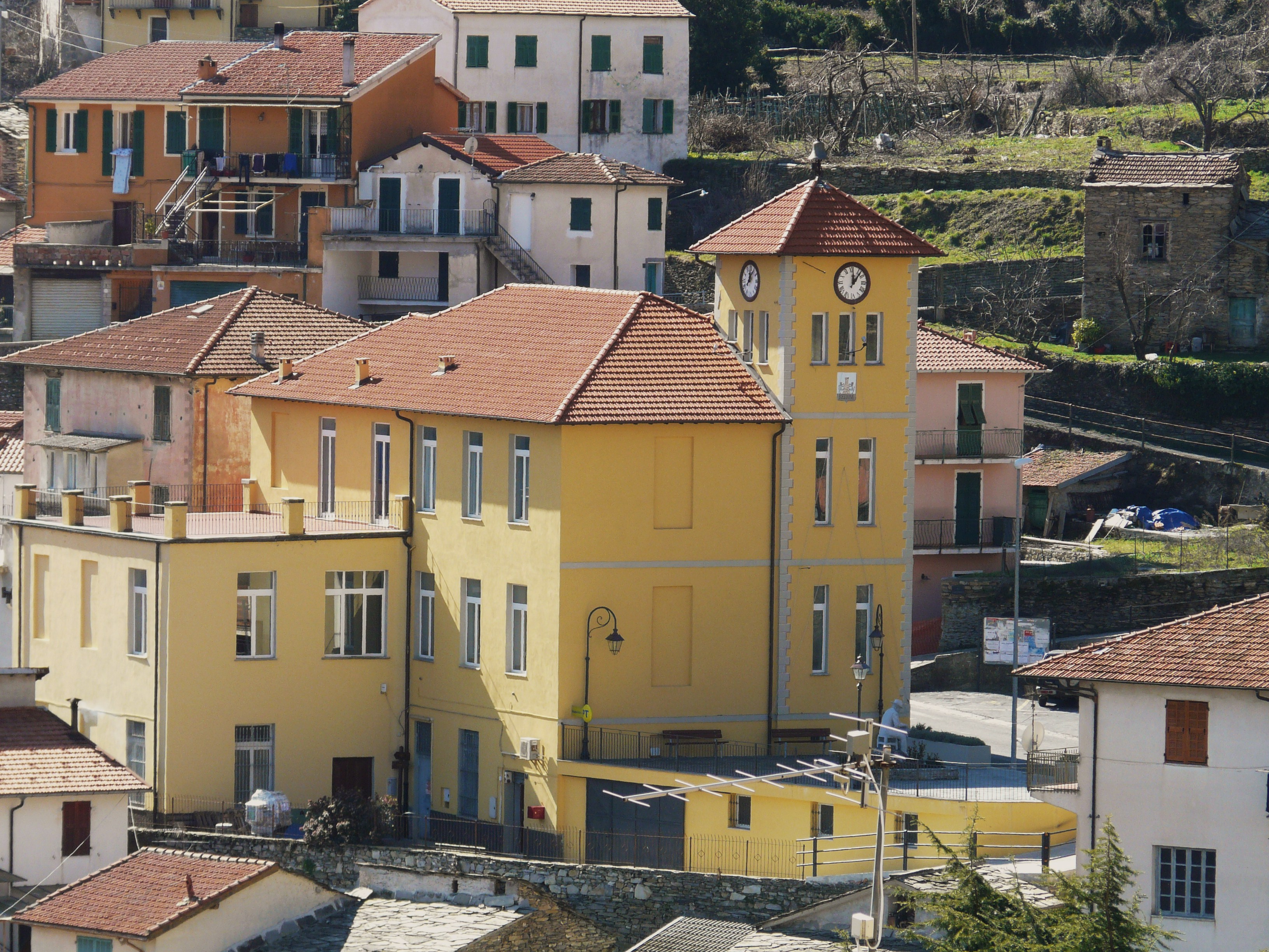 Municipio di Rezzo, Liguria, Italia